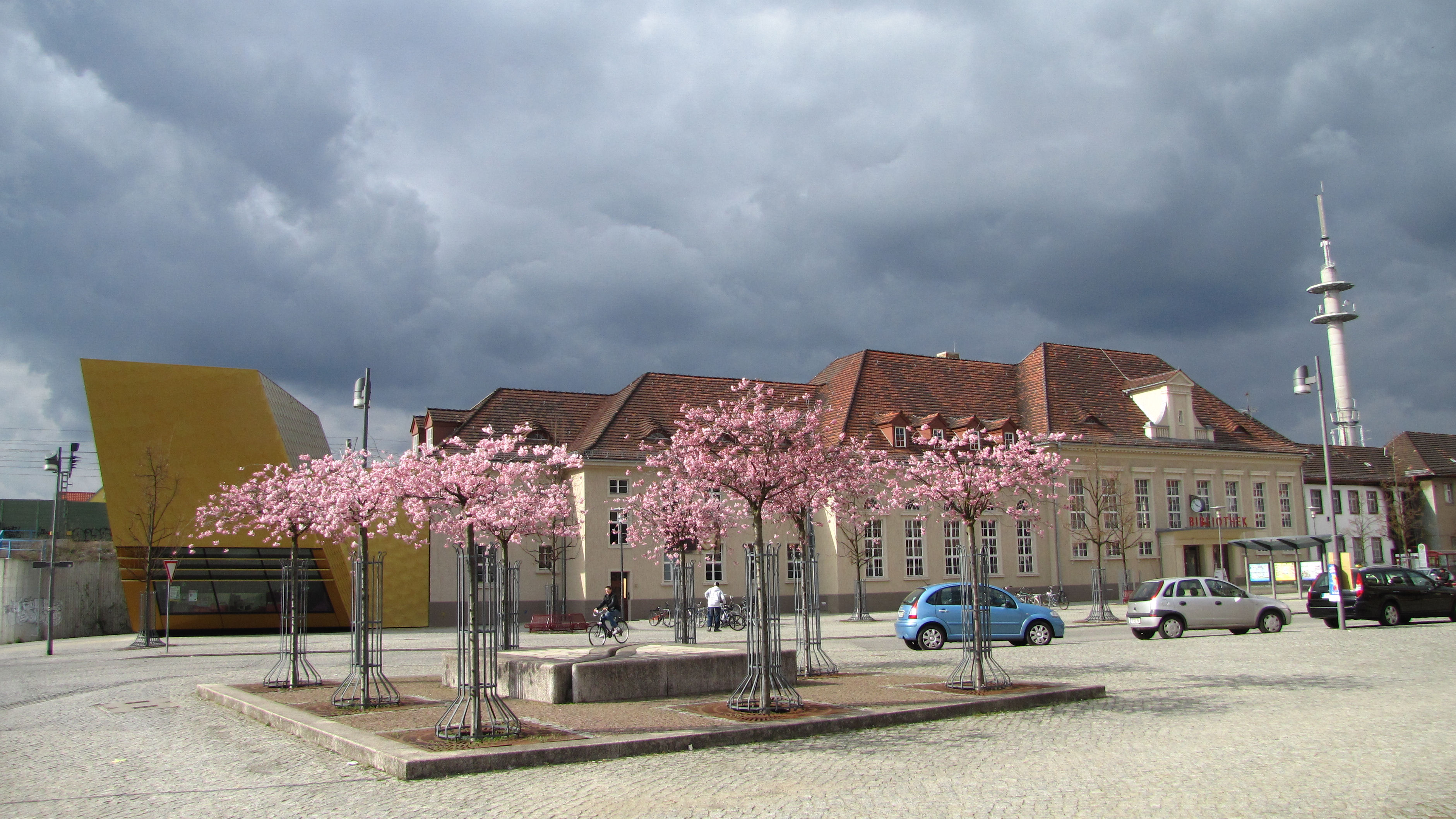 Der Bahnhof wurde von der Stadt Luckenwalde erworben und zur Stadtbibliothek umgebaut. Der goldfarbene moderne Anbau ist die Kinderbibliothek